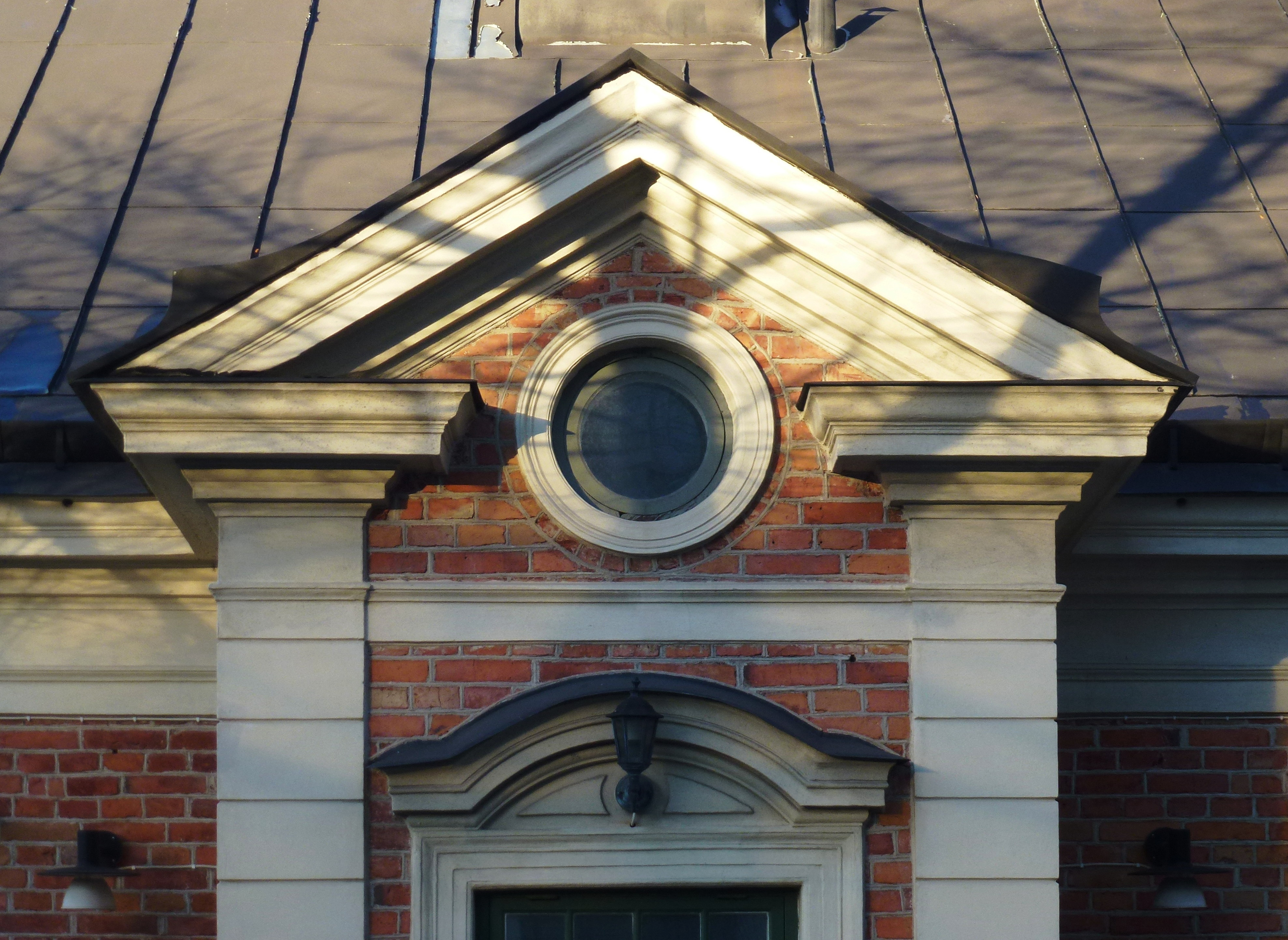 Tegelhuset Södra Station, som uppfördes 1859, är den enda bevarade från västra stambanans tidigare tid